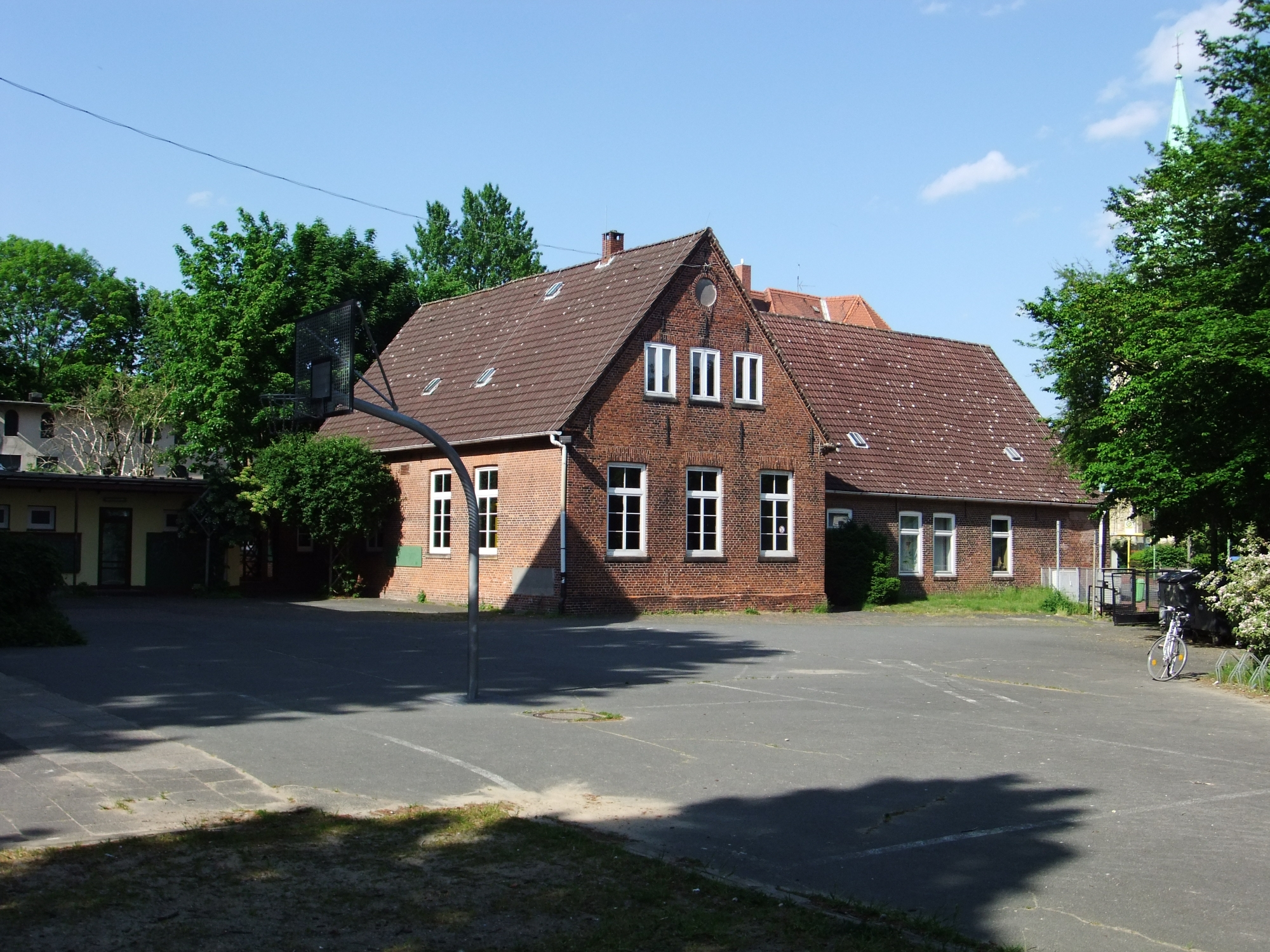 Reformierte Schule, Küsterhaus in Bremerhaven, Lange Straße 88.Das abgebildete Objekt ist ein geschütztes Kulturdenkmal in der Freien Hansestadt Bremen, mit der Nr. 1875 beim Landesamt für Denkmalpflege registriert.